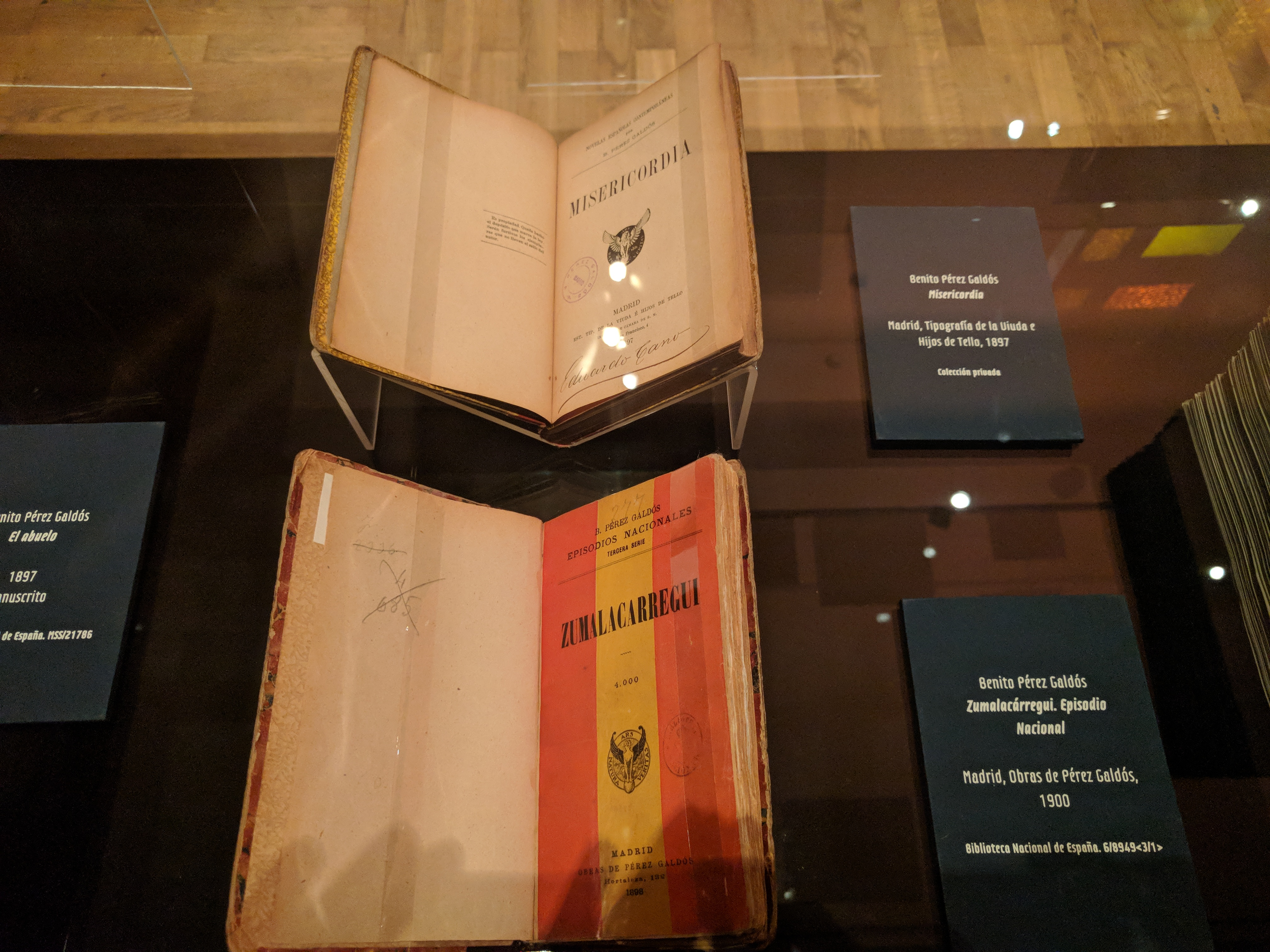 First editions of Misericordia (novlea), 1897, and Zumalacárregui (episodio nacional), 1898, by Benito Pérez Galdós. Biblioteca Nacional de España.